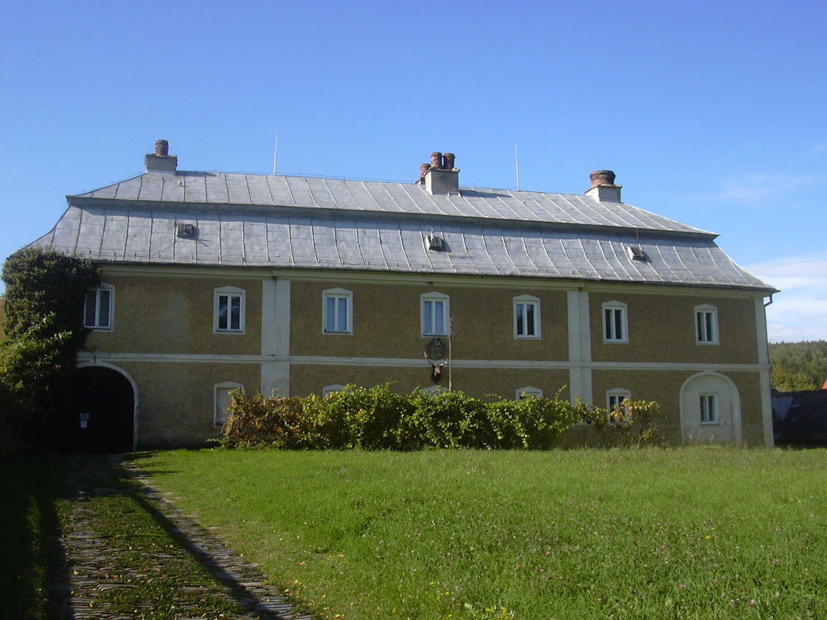 Lovecký zámeček Troyerstein, Rychtářov (Vyškov), Česká republika